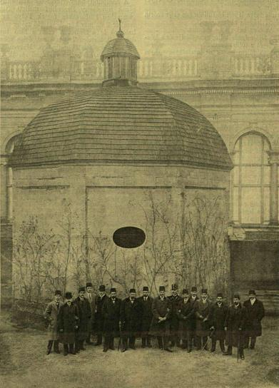 Erdélyi Mór fényképe, Budapest, Gül Baba türbéje, 1910, Vasárapi Újság, 1910. dec. 18. pp 1065.